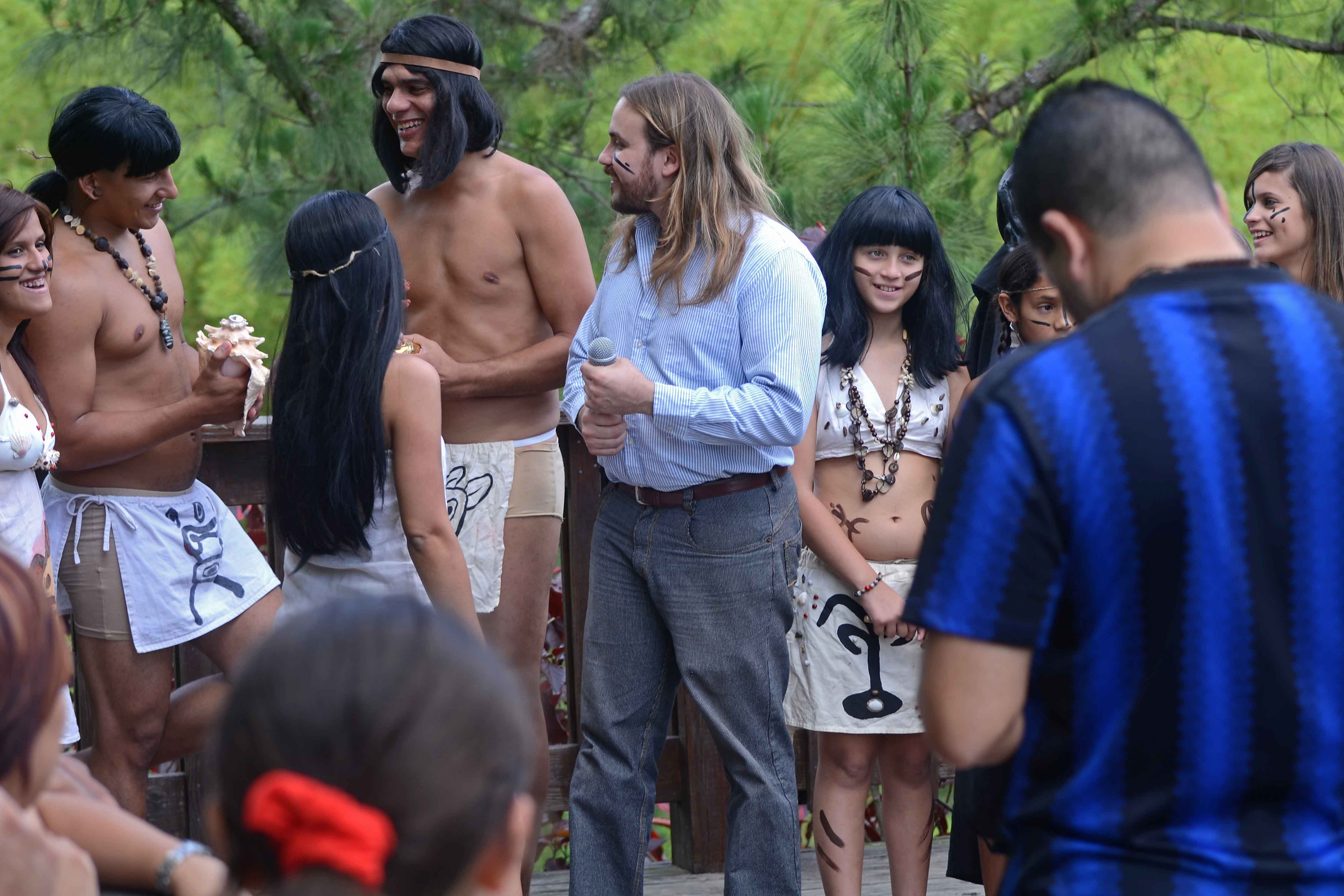 Rio Saliente, Jayuya, Puerto Rico